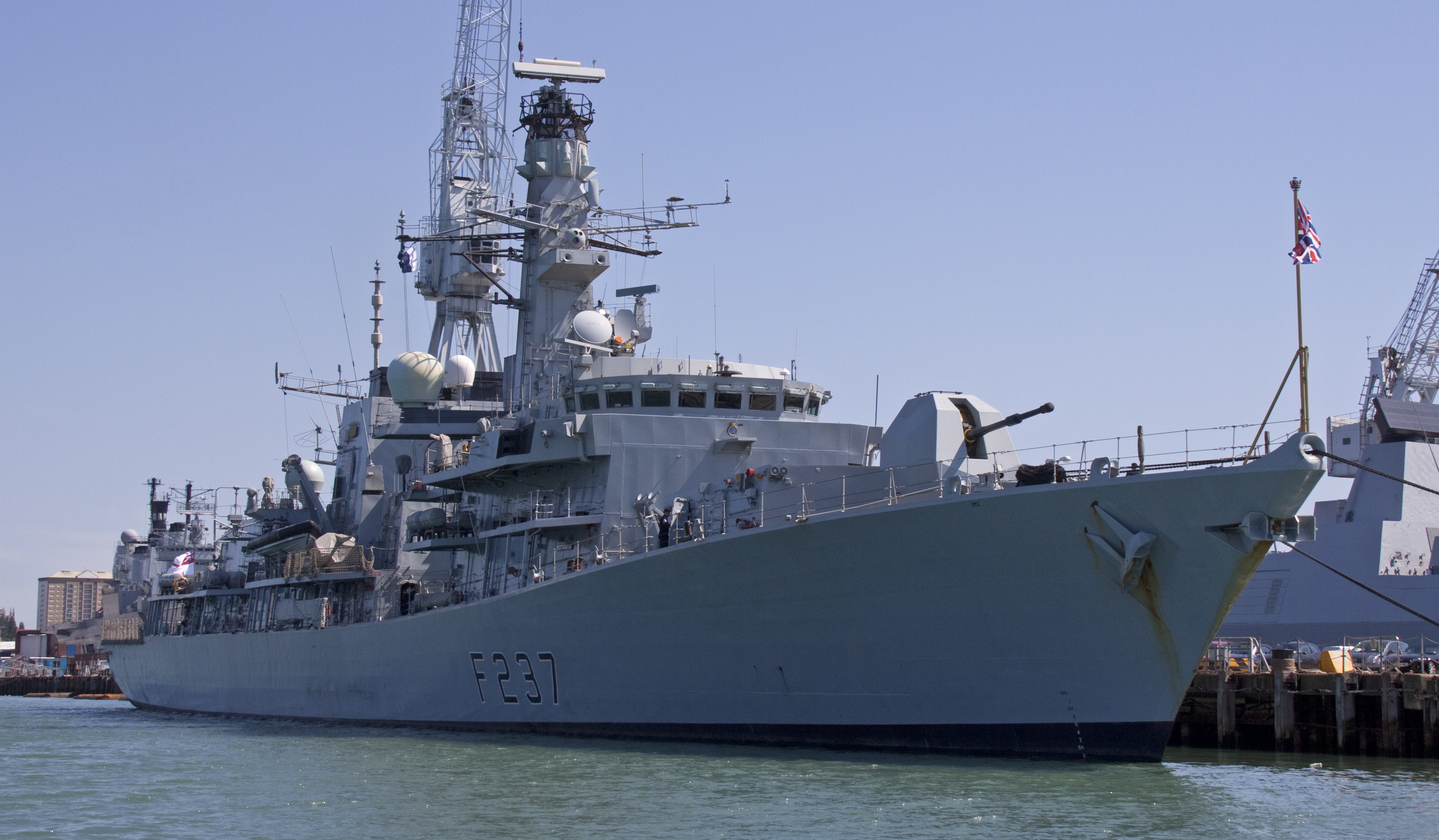 HMS Westminster F237